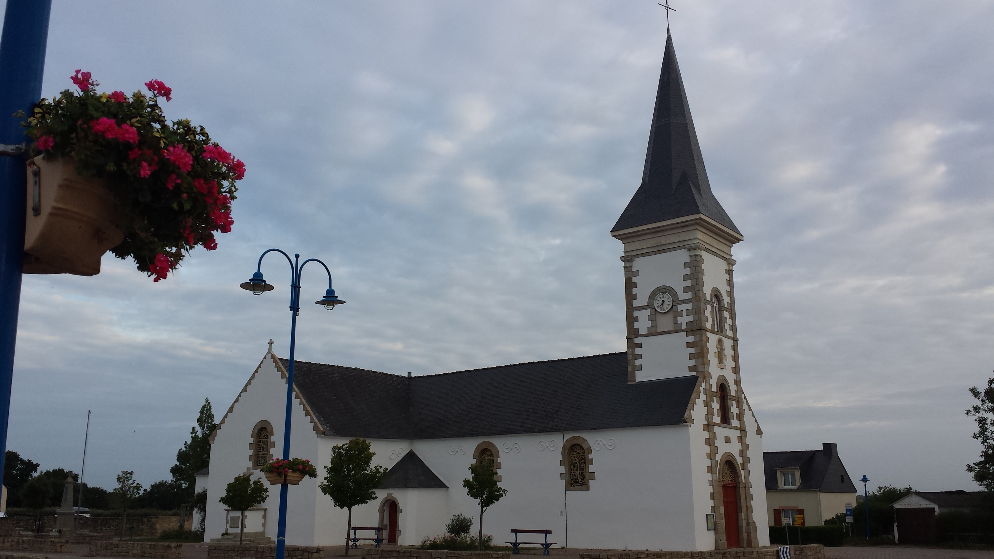 Église Le Tour-du-Parc côté - Presqu'Île de Rhuys - Morbihan ( 56 ) - Bretagne - France